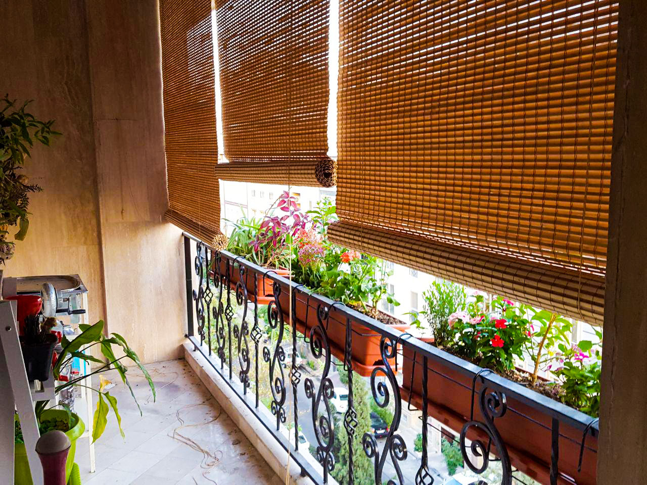 استفاده از پرده بامبو در فضای باز